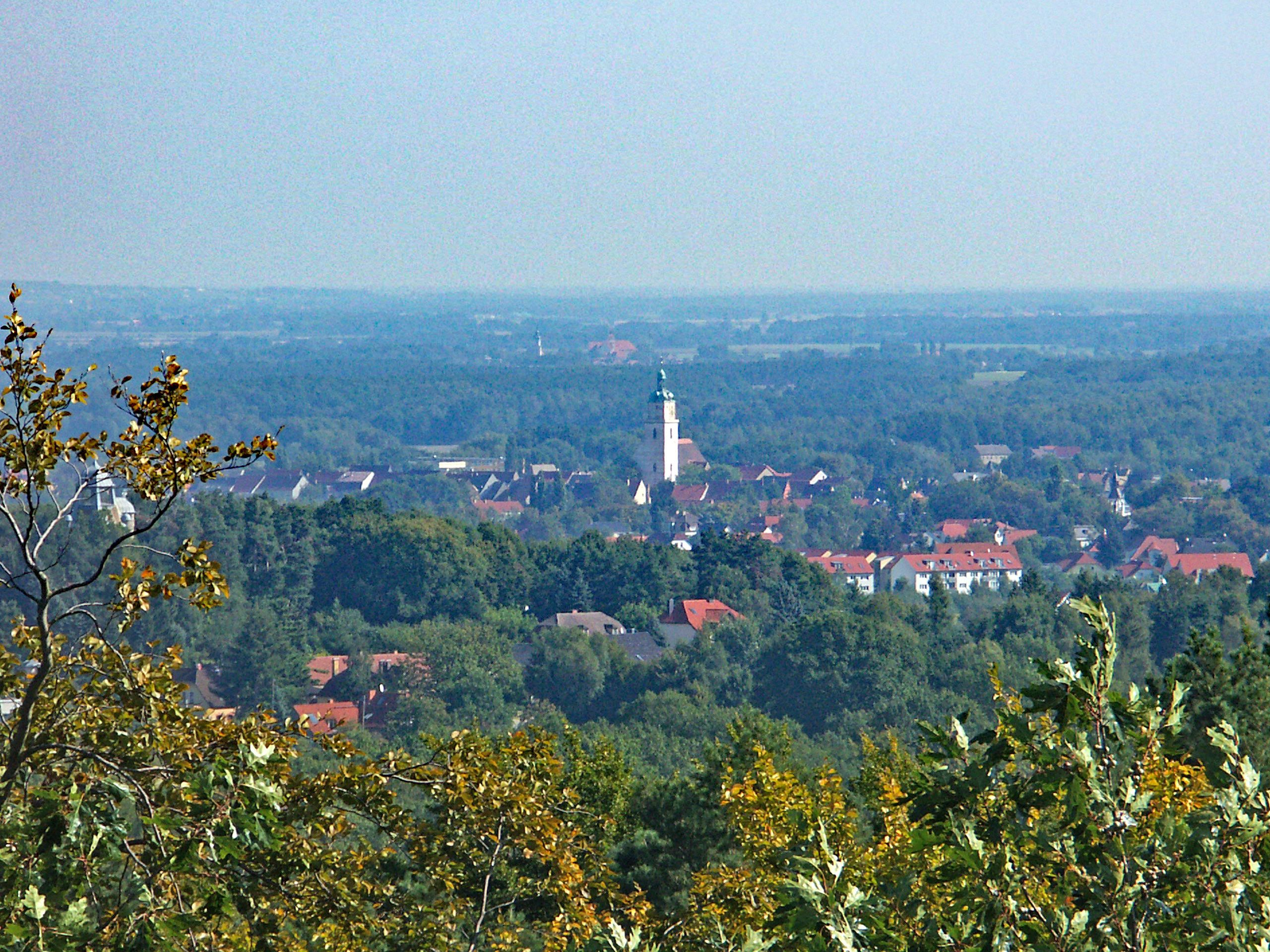 Blick vom Kaiser-Wilhelm-Turm auf Bad Schmiedeberg